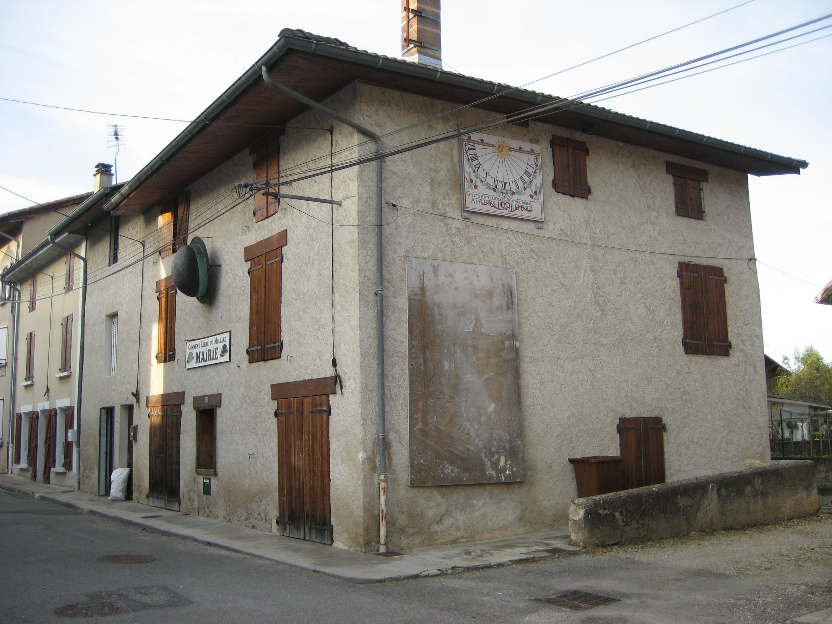 "Mairie" de la Commune libre de Rives / Rives, Isère, France